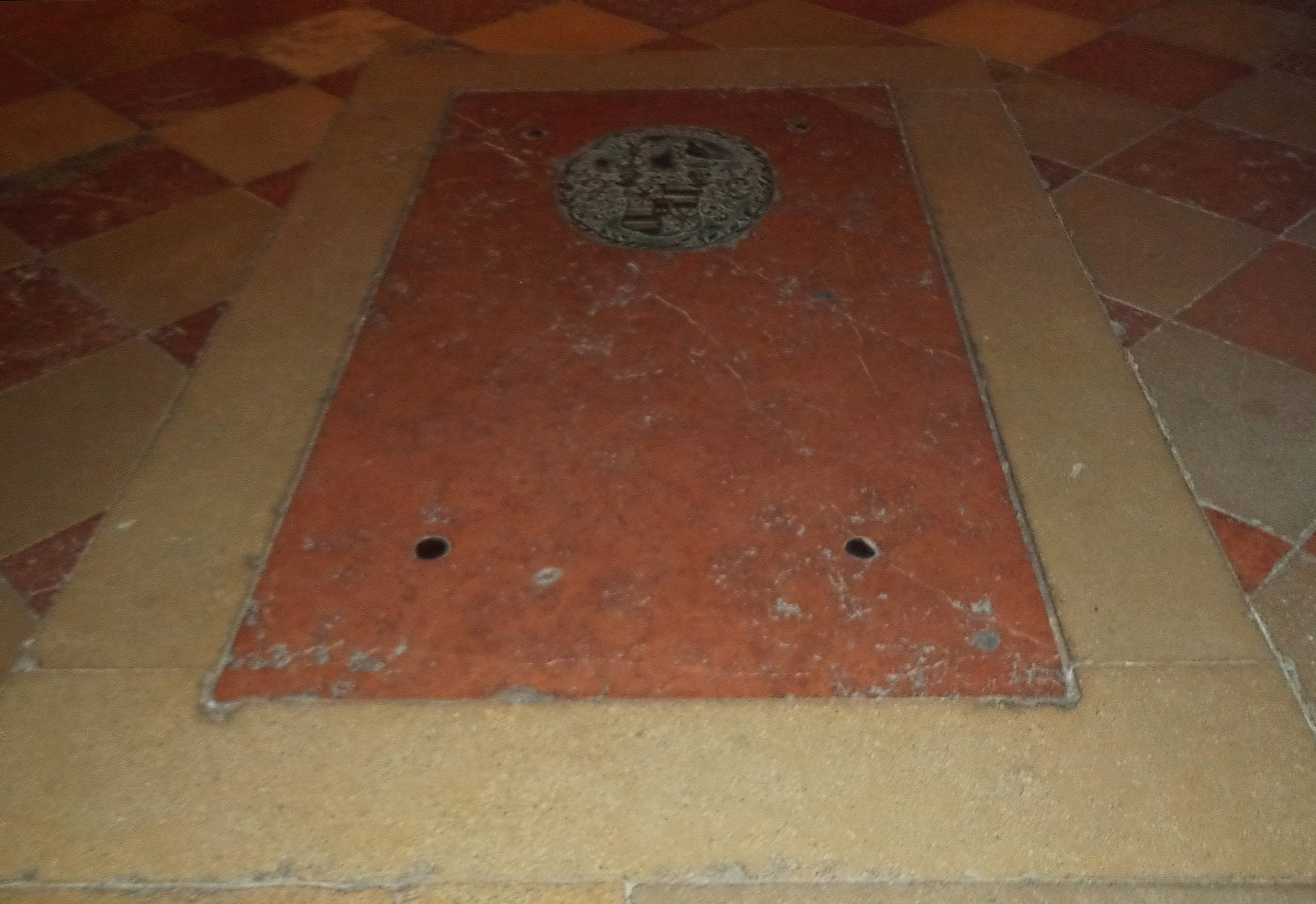 Michaelerkirche Wien, Deckplatte der Werdenberg-Gruft